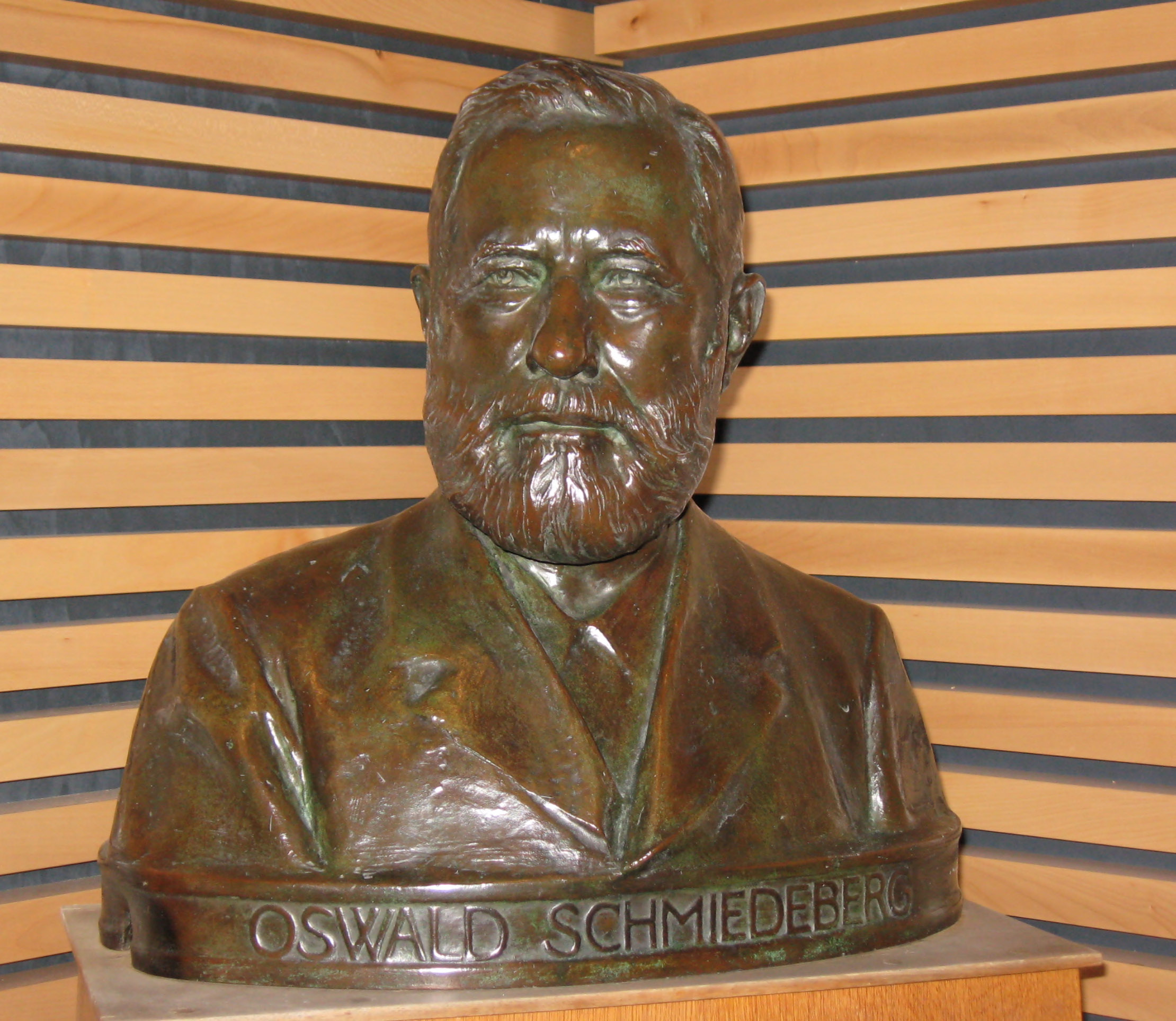 Büste, darstellend Oswald Schmiedeberg, in Freiburg im Breisgau